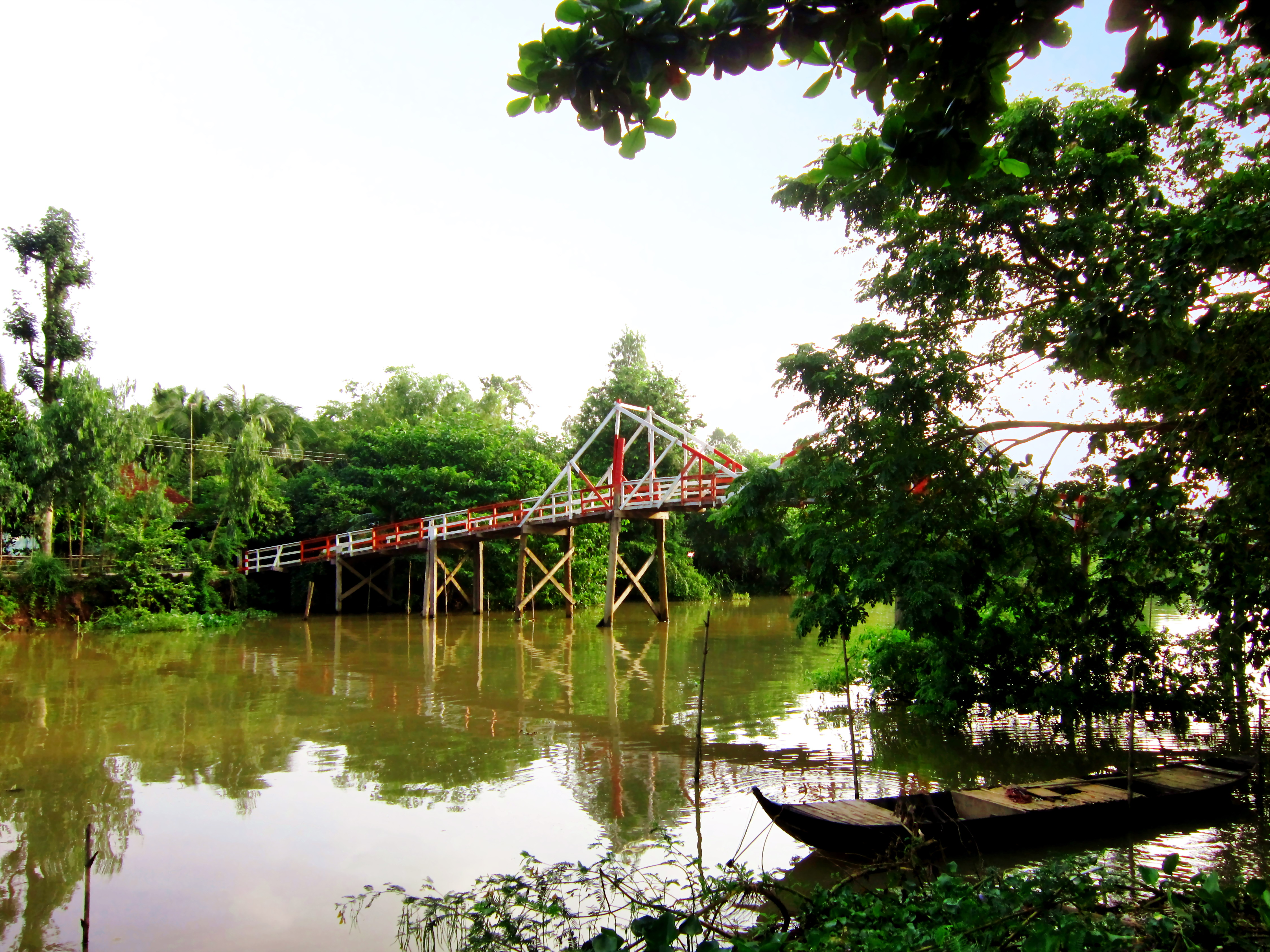 Một cây cầu ở Cần Đăng, huyện Châu Thành, tỉnh An Giang, Việt Nam.